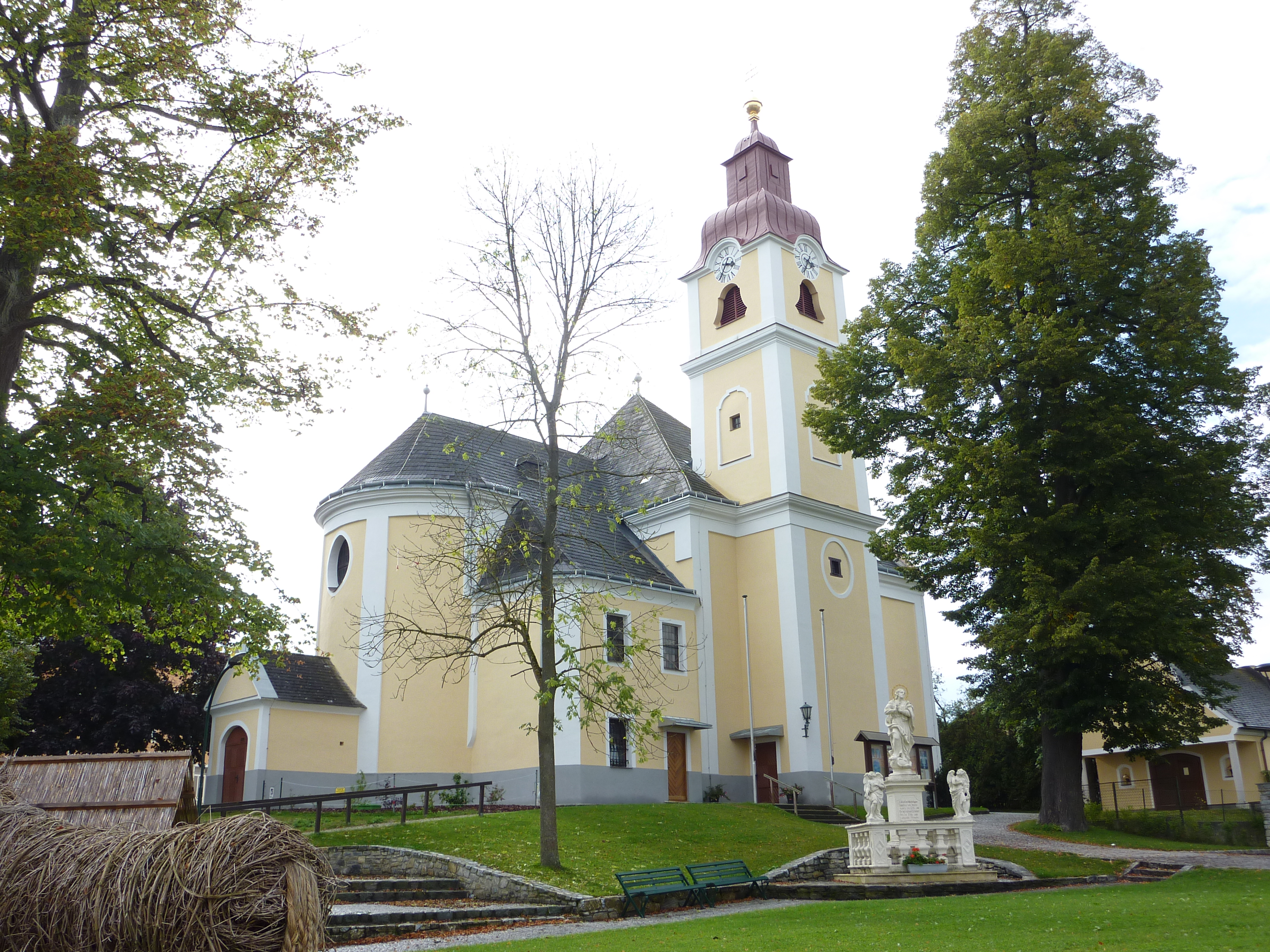 Pfarrkirche, Lichtenau im Waldviertel, Niederösterreich This media shows the natural monument in Lower Austria with the ID KR-094.